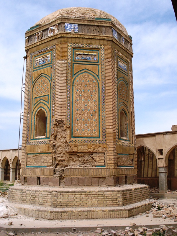 Türkmençe: Gok Kunbet Kerkük Kalesi